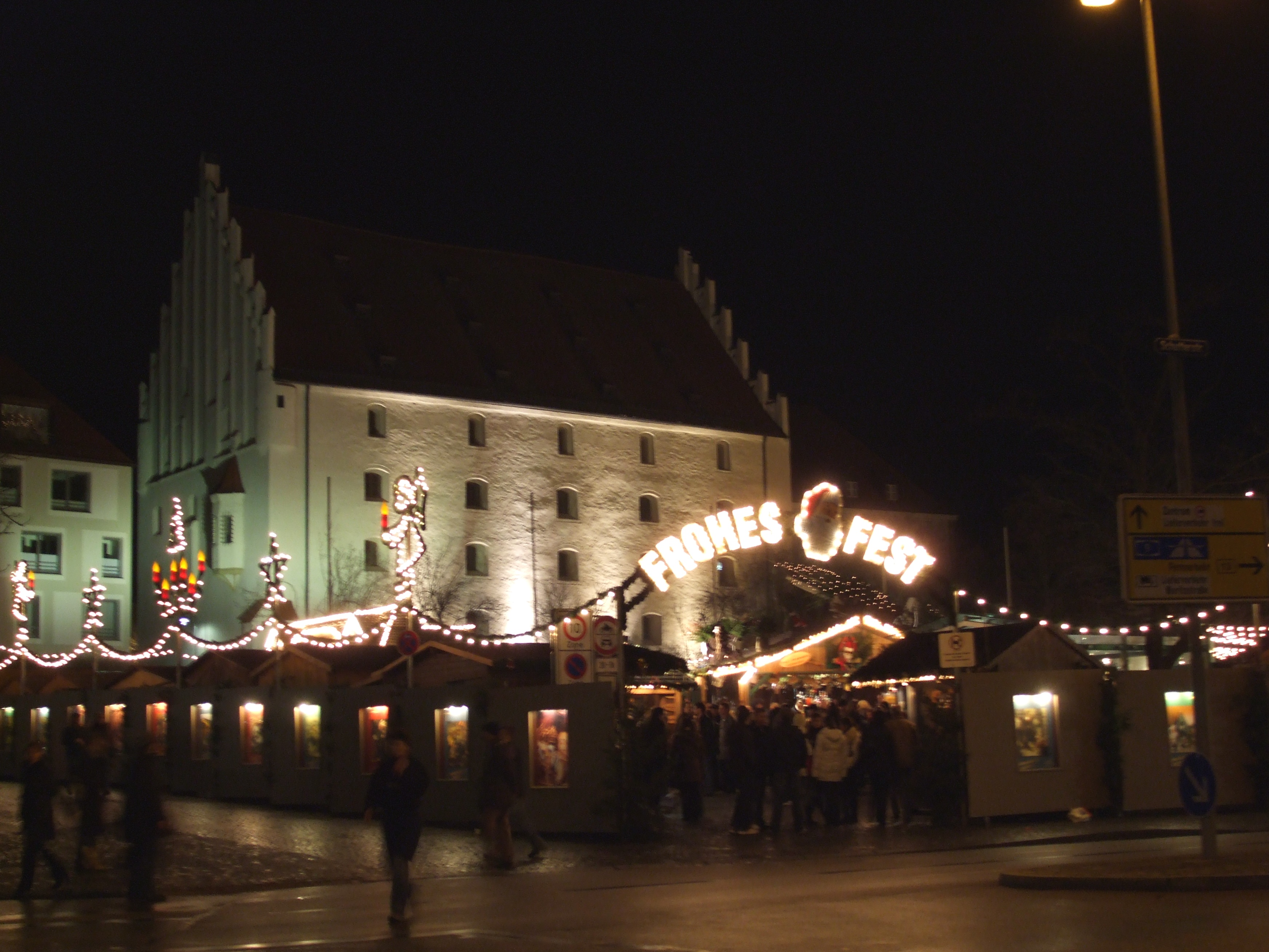 Christkindlmarkt Ingolstadt 2007